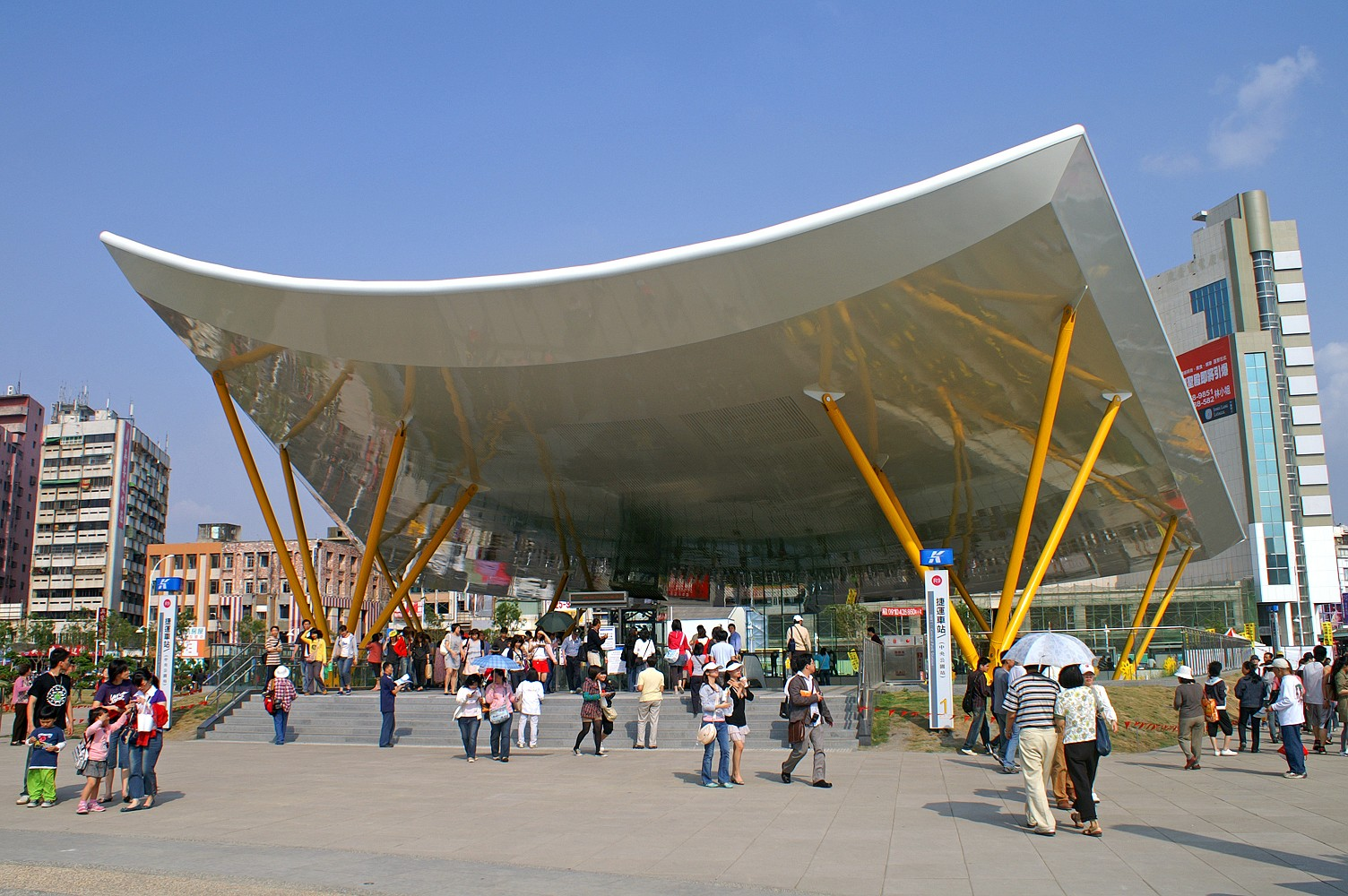 中文（台灣）: 高雄捷運紅線中央公園站。